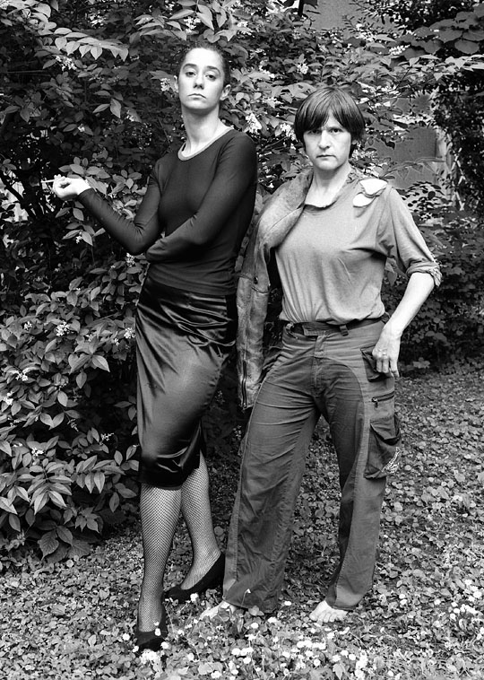 Kovács Ágnes Anna magyar színésznő és Szilágyi Lenke fotóművész.